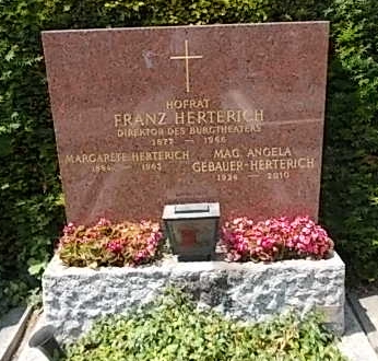 Franz Herterich-Grinzinger Friedhof (20-4-31)